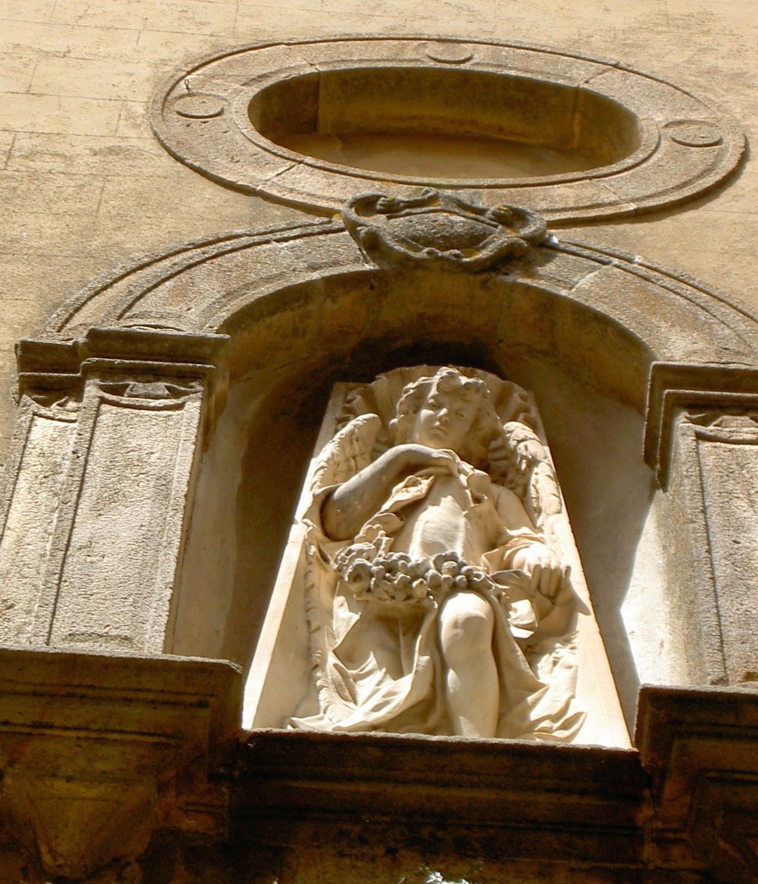 Ange de la Mort (Angelo della Morte), sculpté par Noé Marullo pour orner le fronton de l’église de Saint Vincent à Mistretta (Italie).